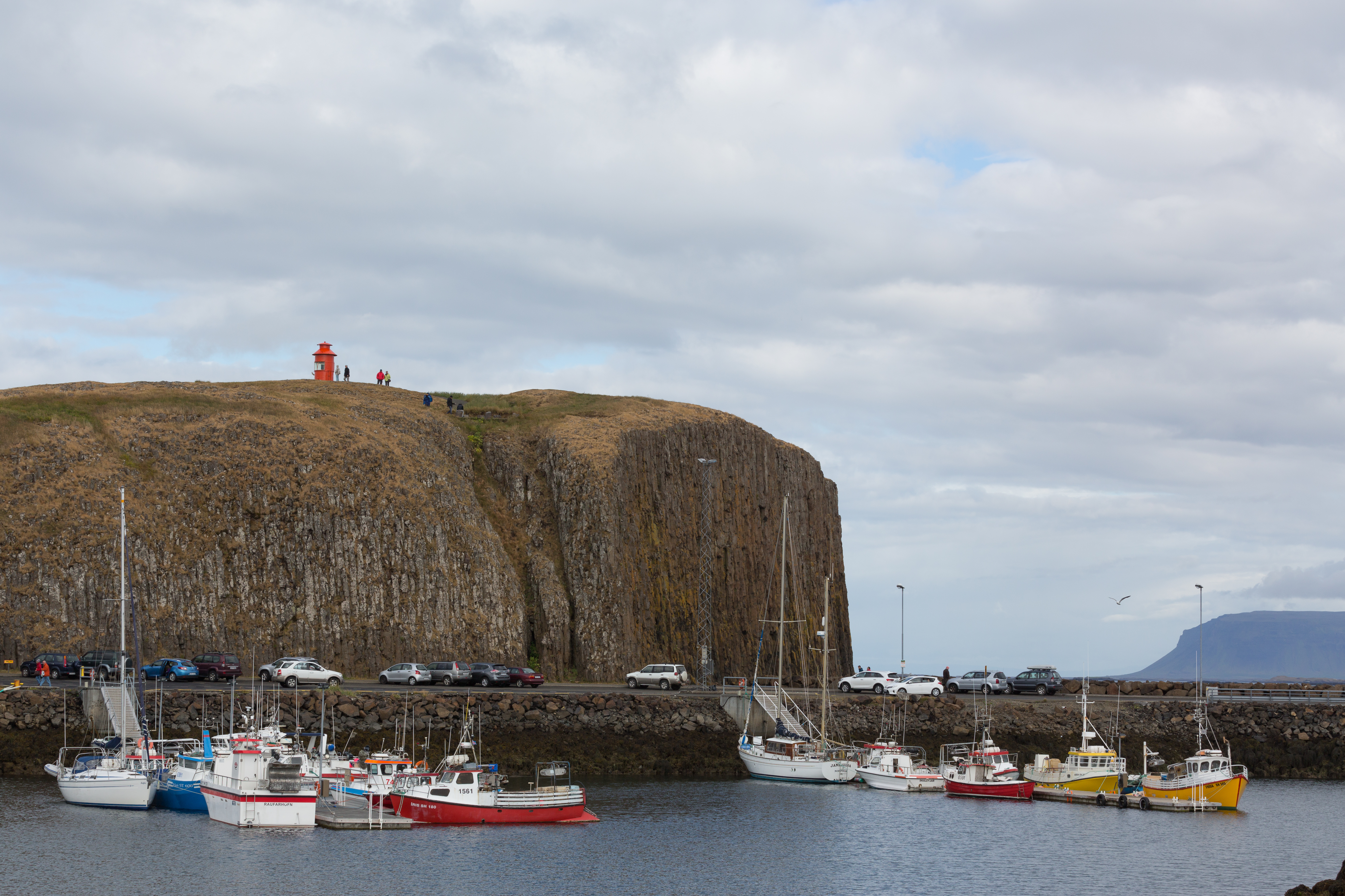 Stykkishólmur havn og fyrtårn